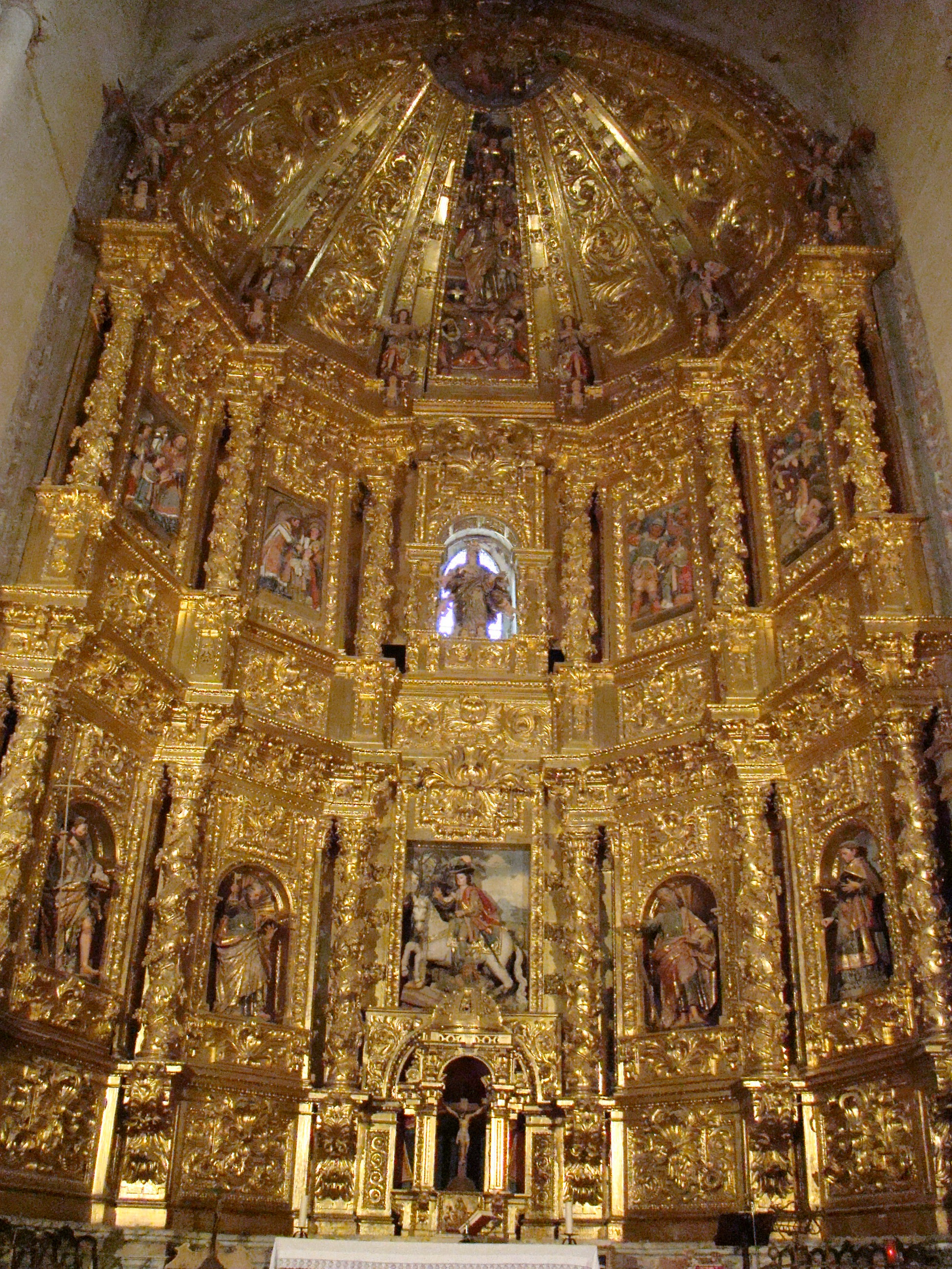 Iglesia de San Hipólito en Támara de Campos (Palencia, España). Retablo mayor, obra barroca de 1691 de Fernando de la Peña. Dorado por los pintores Lorenzo Medina y Lucas de la Concha en 1705.